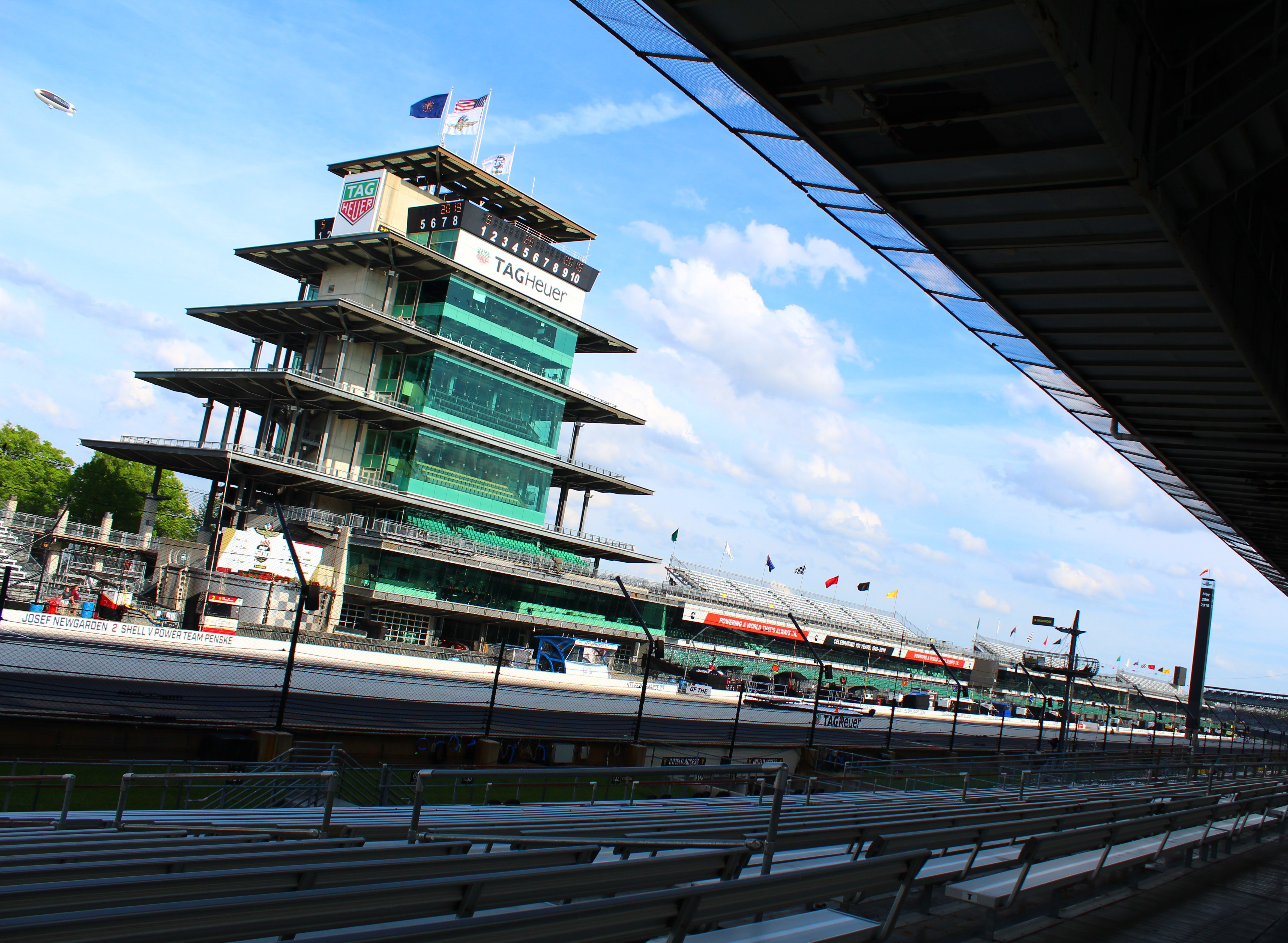 2019 Indianapolis 500